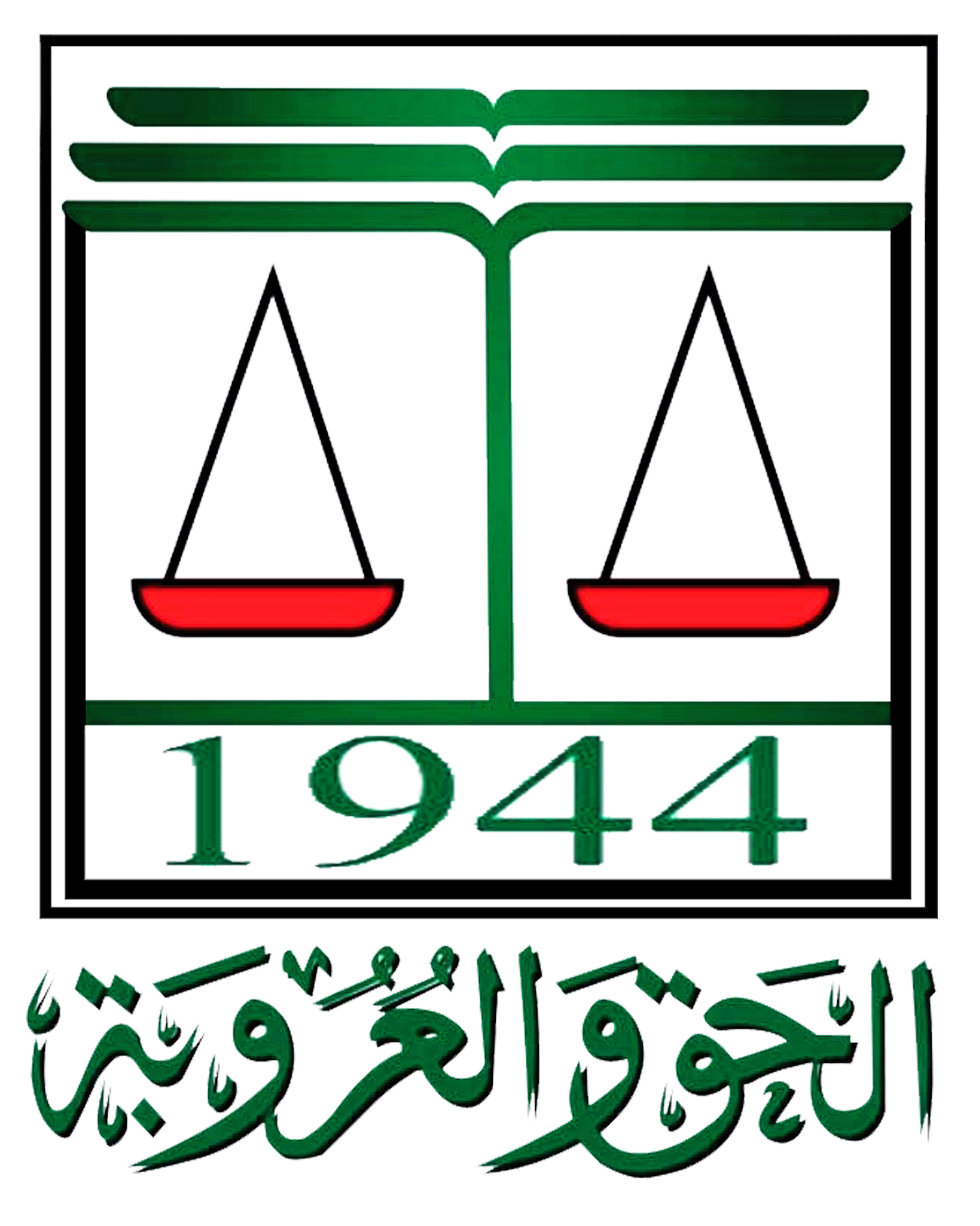 شعار اتحاد المحامين العرب